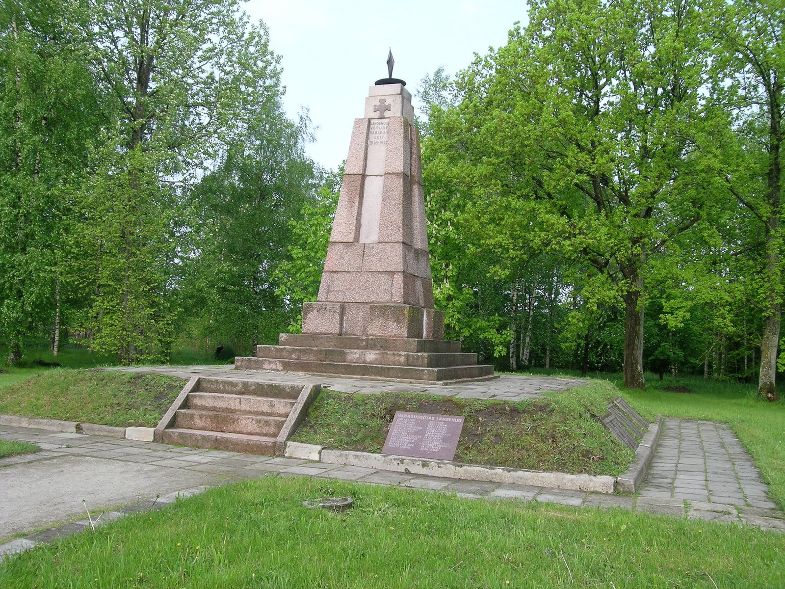 Lihula Vabadussõja mälestussammas